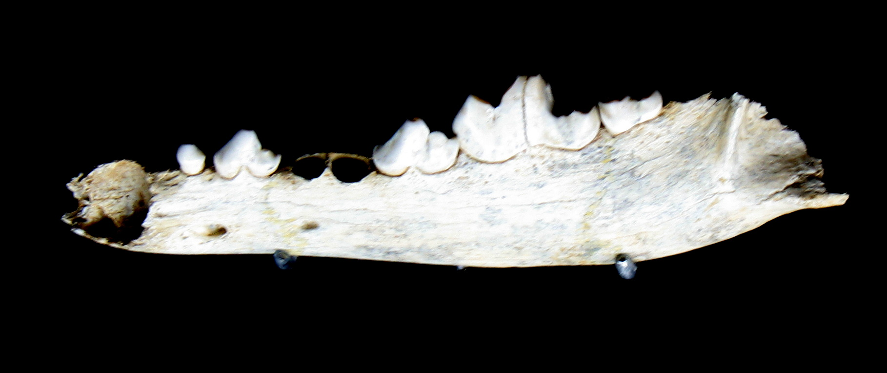 Mandíbula de Canis lupus del Pleistoceno Superior (Cueva del Camino, Pinilla del Valle, Madrid, España). Ejemplar en el Museo Arqueológico Regional de la Comunidad de Madrid (Alcalá de Henares)